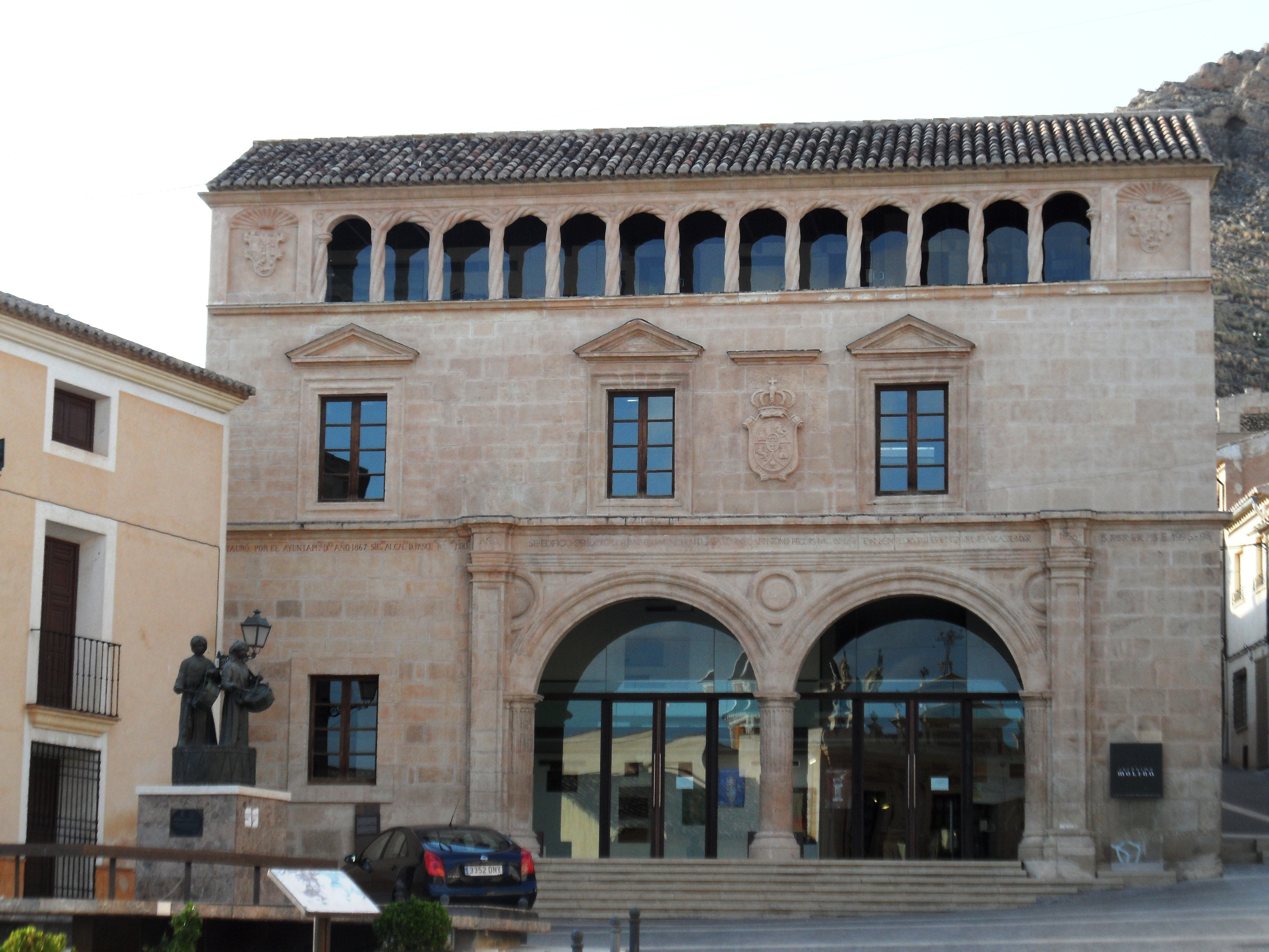 Museo arqueológico.